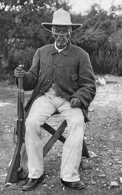 Der Nama-Führer Hendrik Witbooi, um 1900. Nach dem Tod von Witbooi im Oktober 1905 führten Jacob Marengo, Cornelius Frederiks und Abraham Morris den Guerillakampf der Nama gegen die deutsche Schutztruppe fort.